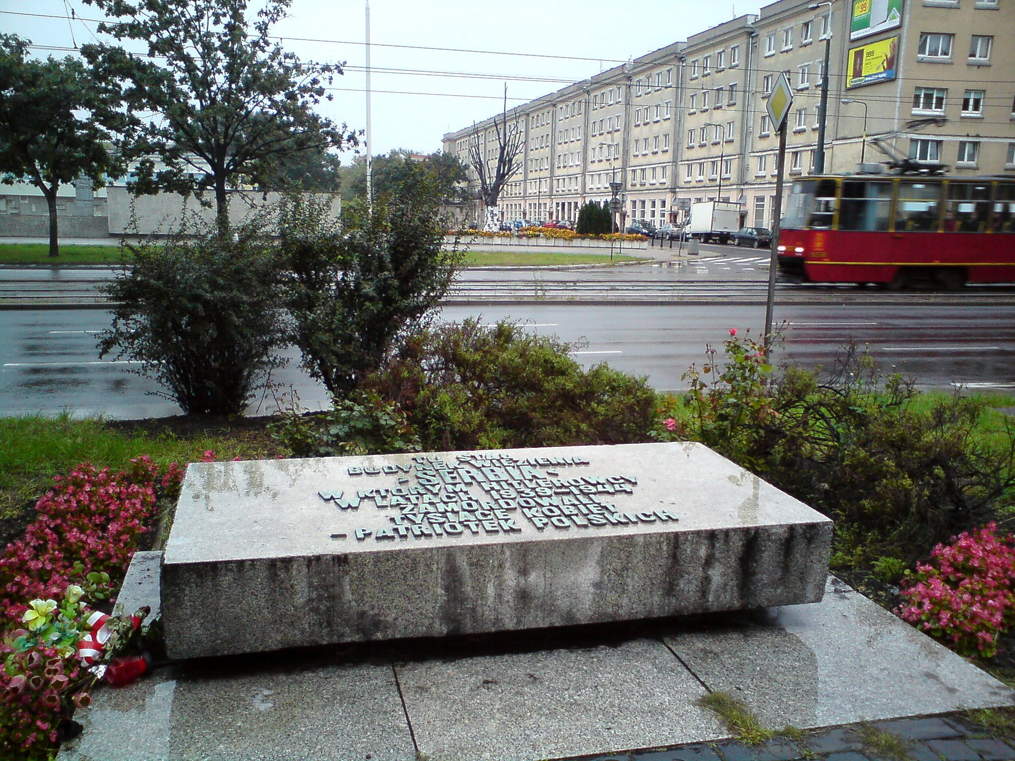 Serbia - pomnik upamietniający więzienie dla kobiet w Warszawie